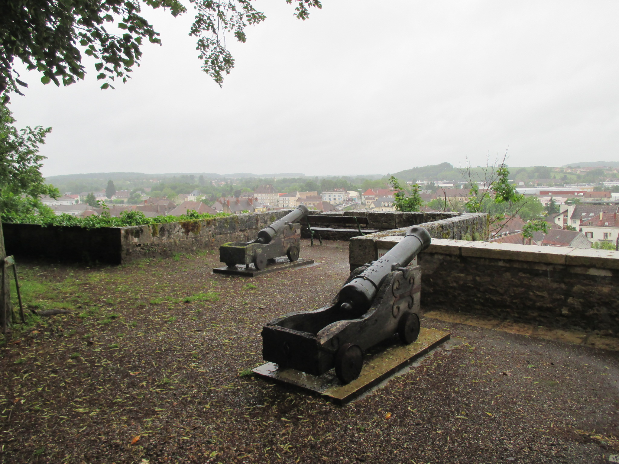 Château de Gray, canons de 1856